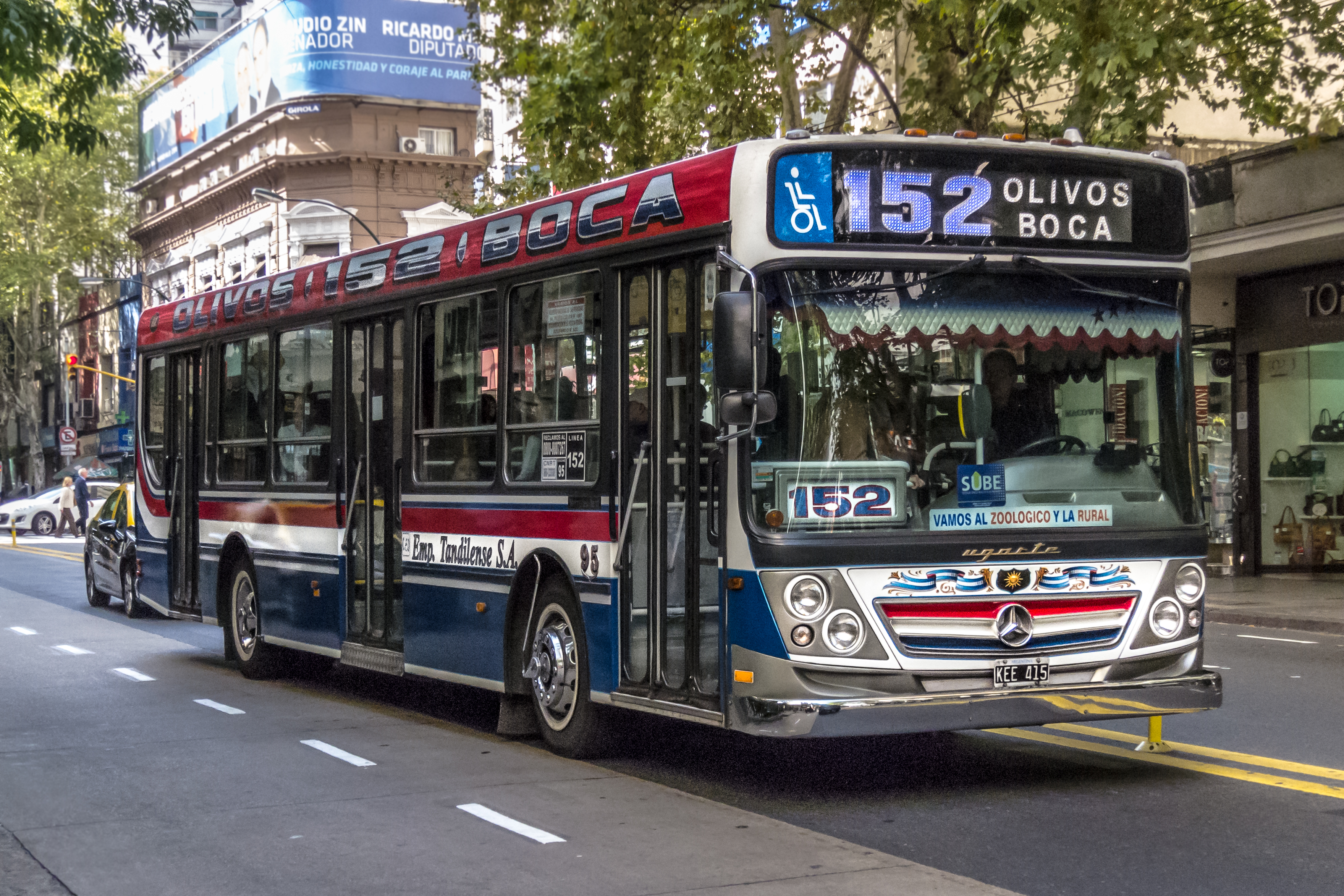 Colectivo de la Línea 152, interno 95, carrocería Ugarte, chasis Mercedez-Benz OH 1718L-SB, matrícula KEE415. Buenos Aires, Argentina.